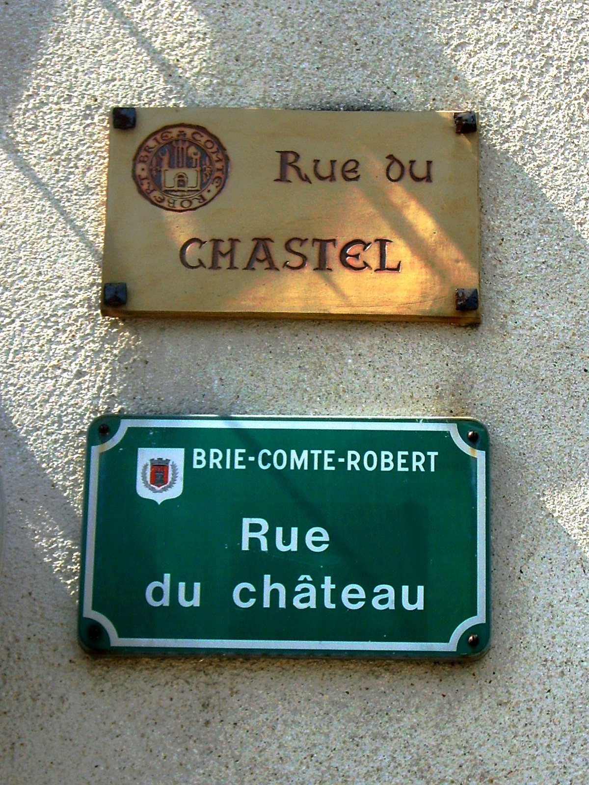 Panneaux noms de rues (Rue du Château actuellement - Rue du Chastel autrefois)